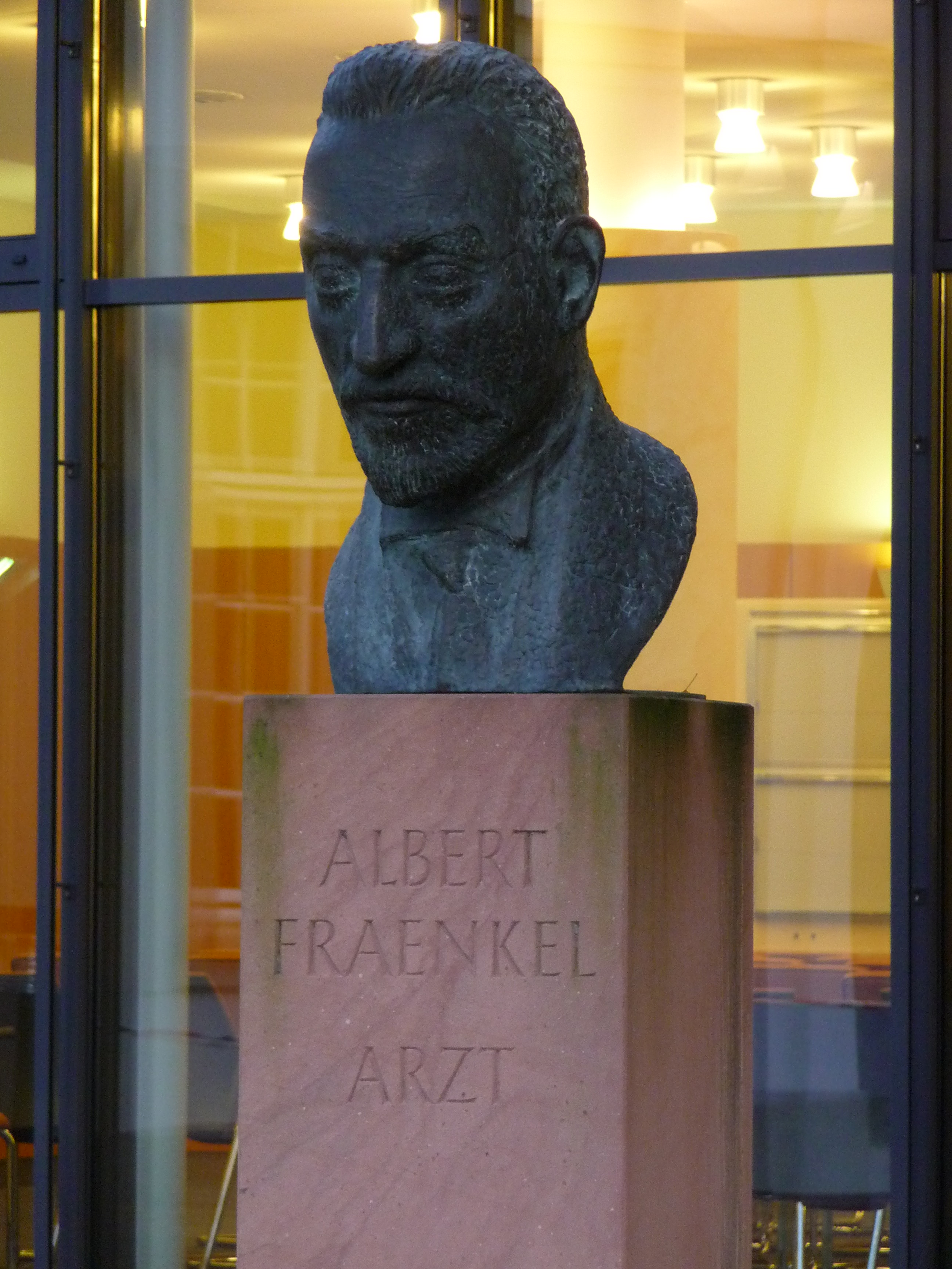 Büste des Mediziners Albert Fraenkel (1864–1938), 2004 geschaffen von Helmut Heinze; fotografiert auf dem Gelände der Thorax-Klinik im Heidelberger Stadtteil Rohrbach (Baden-Württemberg, Deutschland)